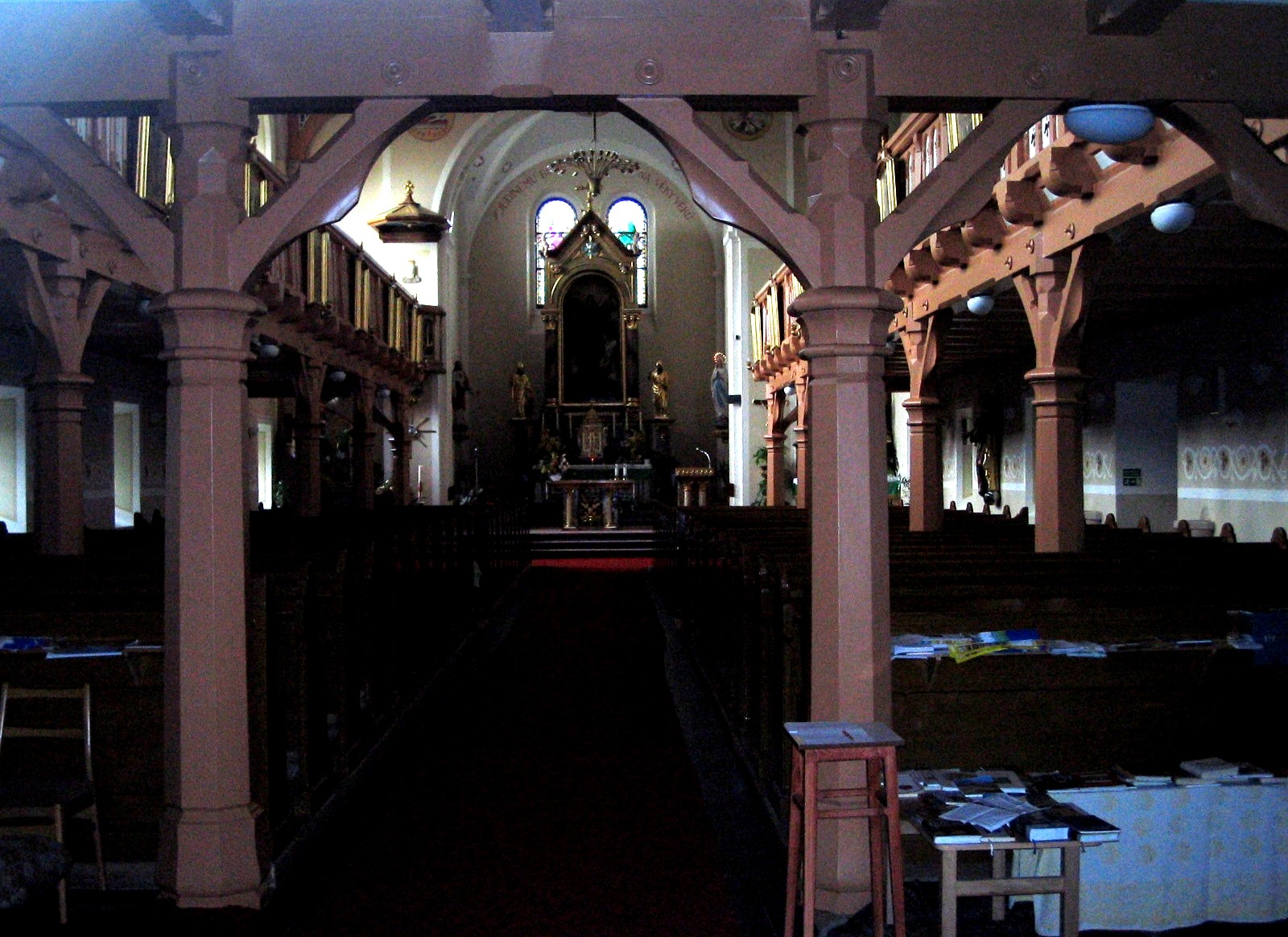 Interiér kostela Všech Svatých v Lipově, okres Hodonín